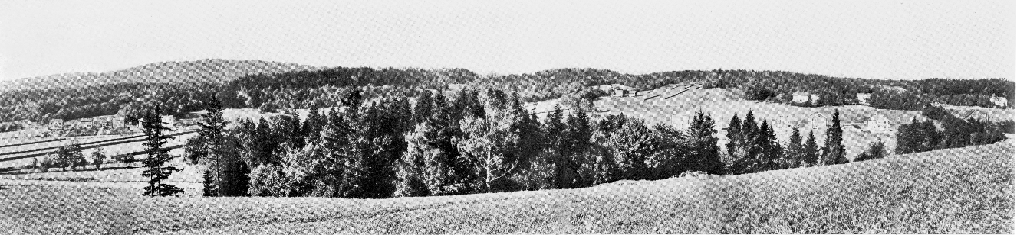 Området for det senere Sogn haveby, tatt ved Bergslia